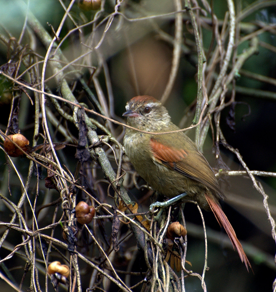 Pallid Spinetail (Cranioleuca pallida) Horto Florestal de São Paulo